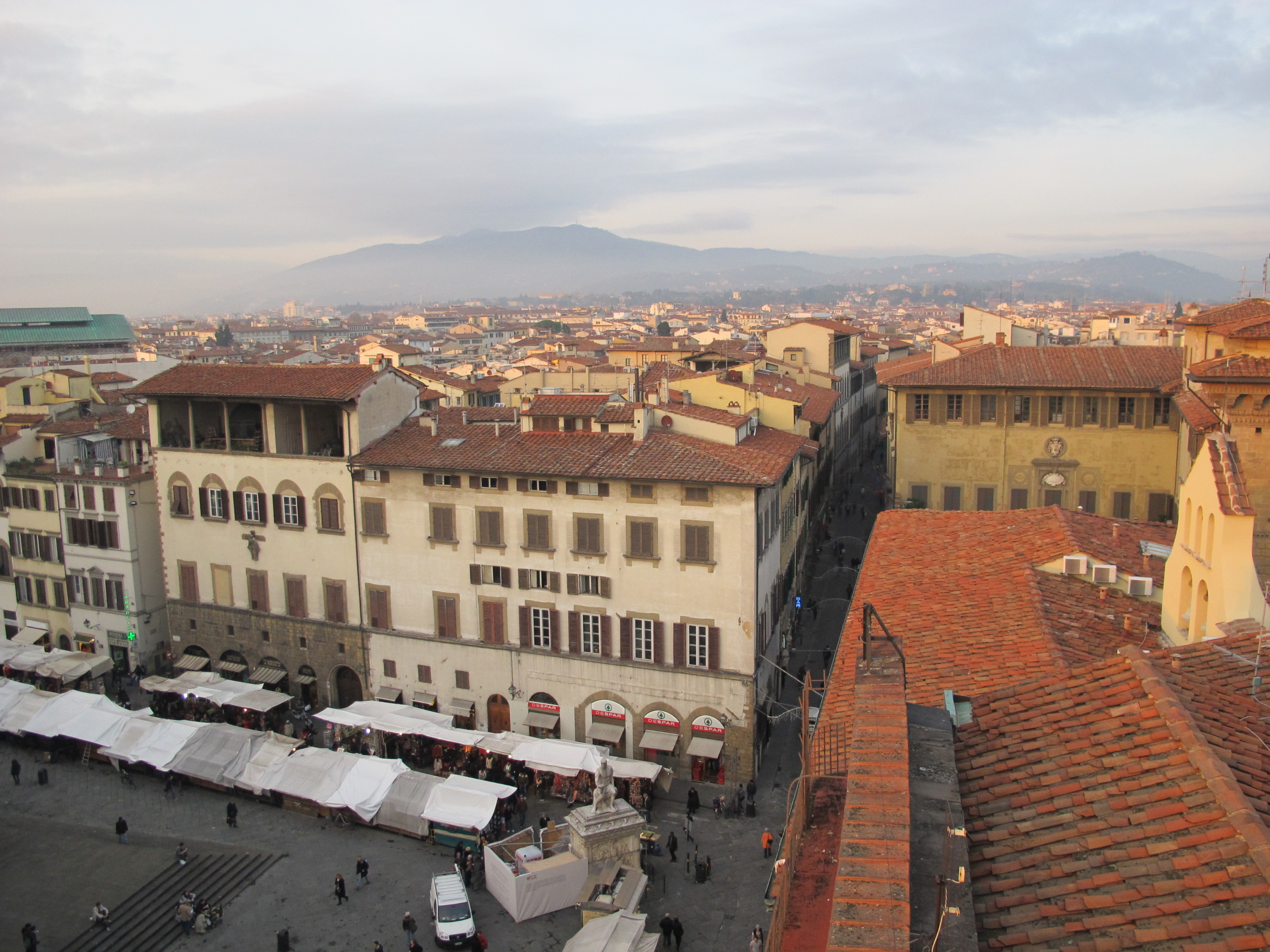 Ximeniano, veduta piazza san lorenzo